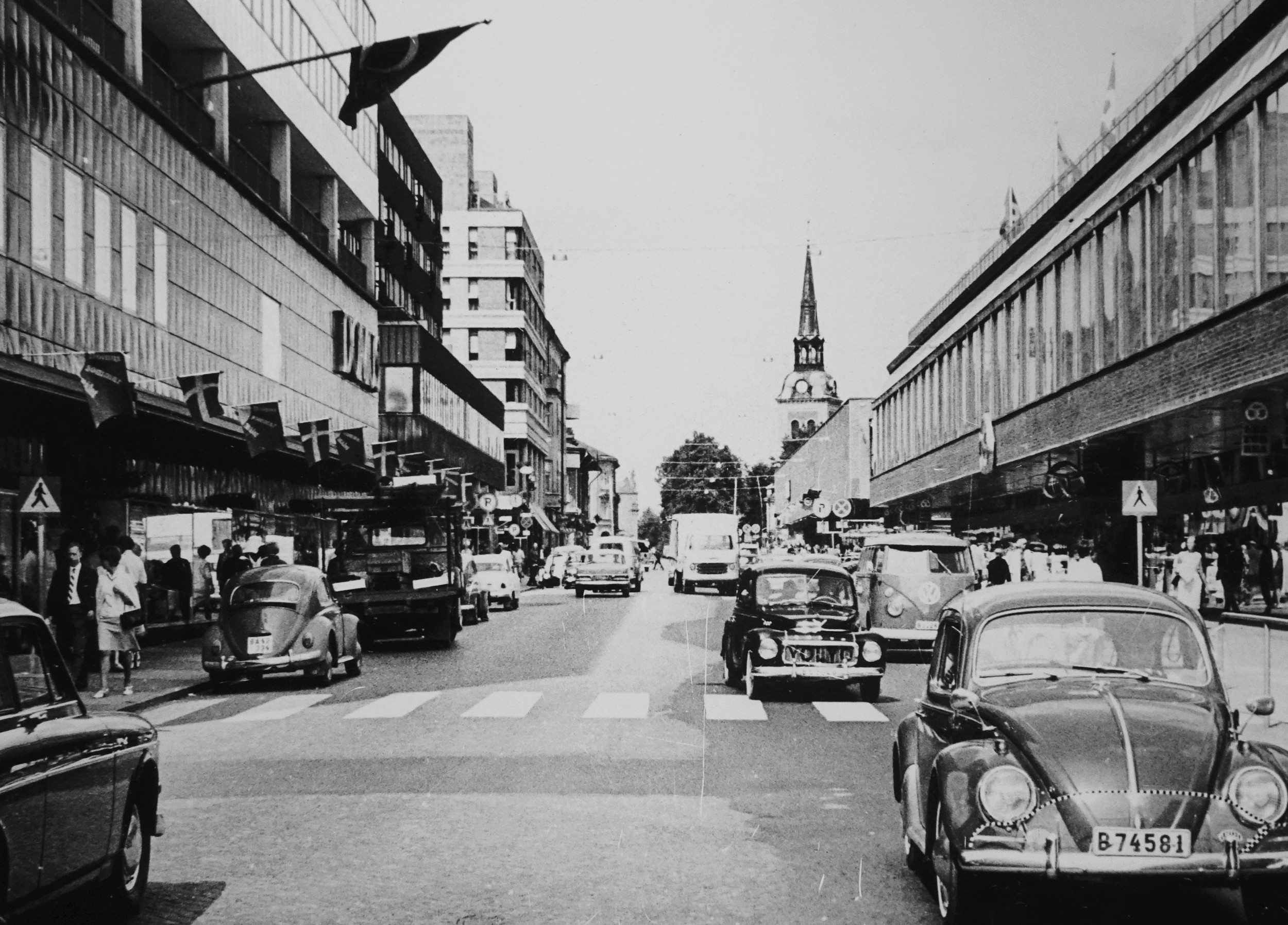 Storgatan mot norr med nybyggda varuhusen Domus, Kringlan och Tempo